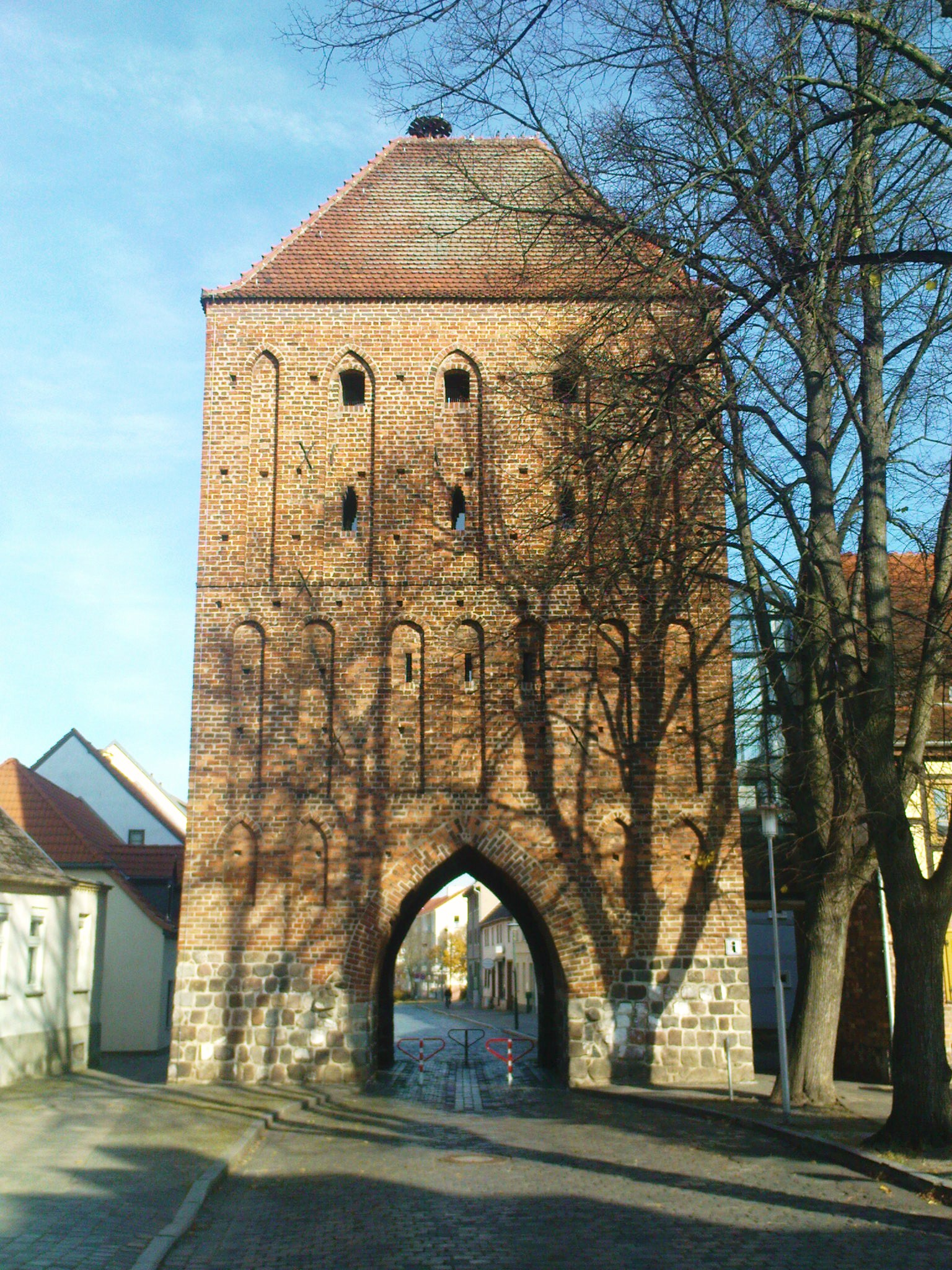 Feldseite des Prenzlauer Tores in Pasewalk